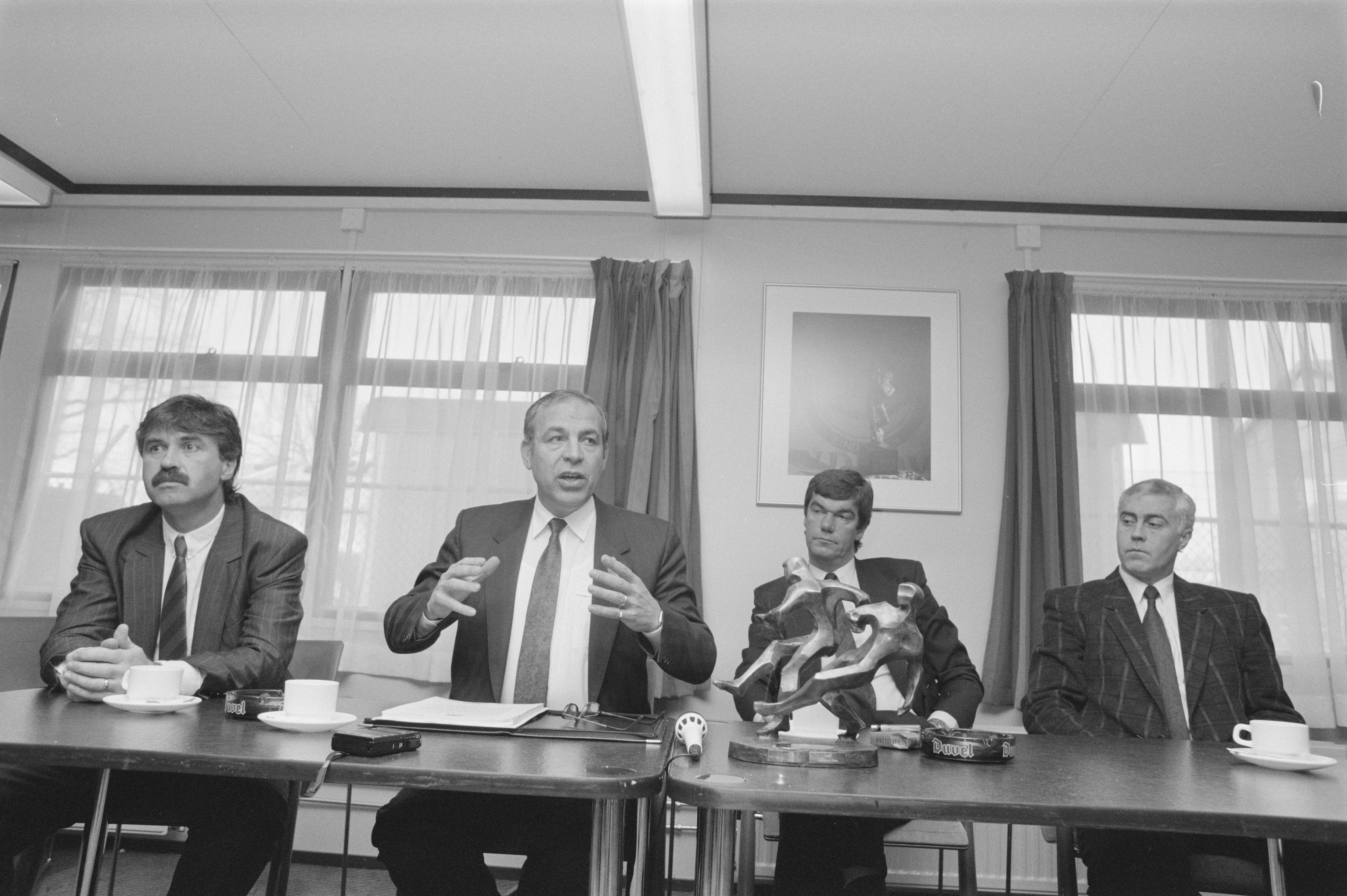 Collectie / Archief : Fotocollectie Anefo Reportage / Serie : [ onbekend ] Beschrijving : Persconferentie PSV; Guus Hiddink , voorzitter J. Ruts , manager K. Ploegsma en trainer/coach Hans Dorjee met op voorgrond PSV-emble Datum : 11 januari 1988 Trefwoorden : managers, persconferenties, sport, voetbal, voorzitters Persoonsnaam : Guus Hiddink, Hans Dorjee, J. Ruts, K. Ploegsma Instellingsnaam : PSV Fotograaf : Bogaerts, Rob / Anefo Auteursrechthebbende : Nationaal Archief Materiaalsoort : Negatief (zwart/wit) Nummer archiefinventaris : bekijk toegang 2.24.01.05 Bestanddeelnummer : 934-1663